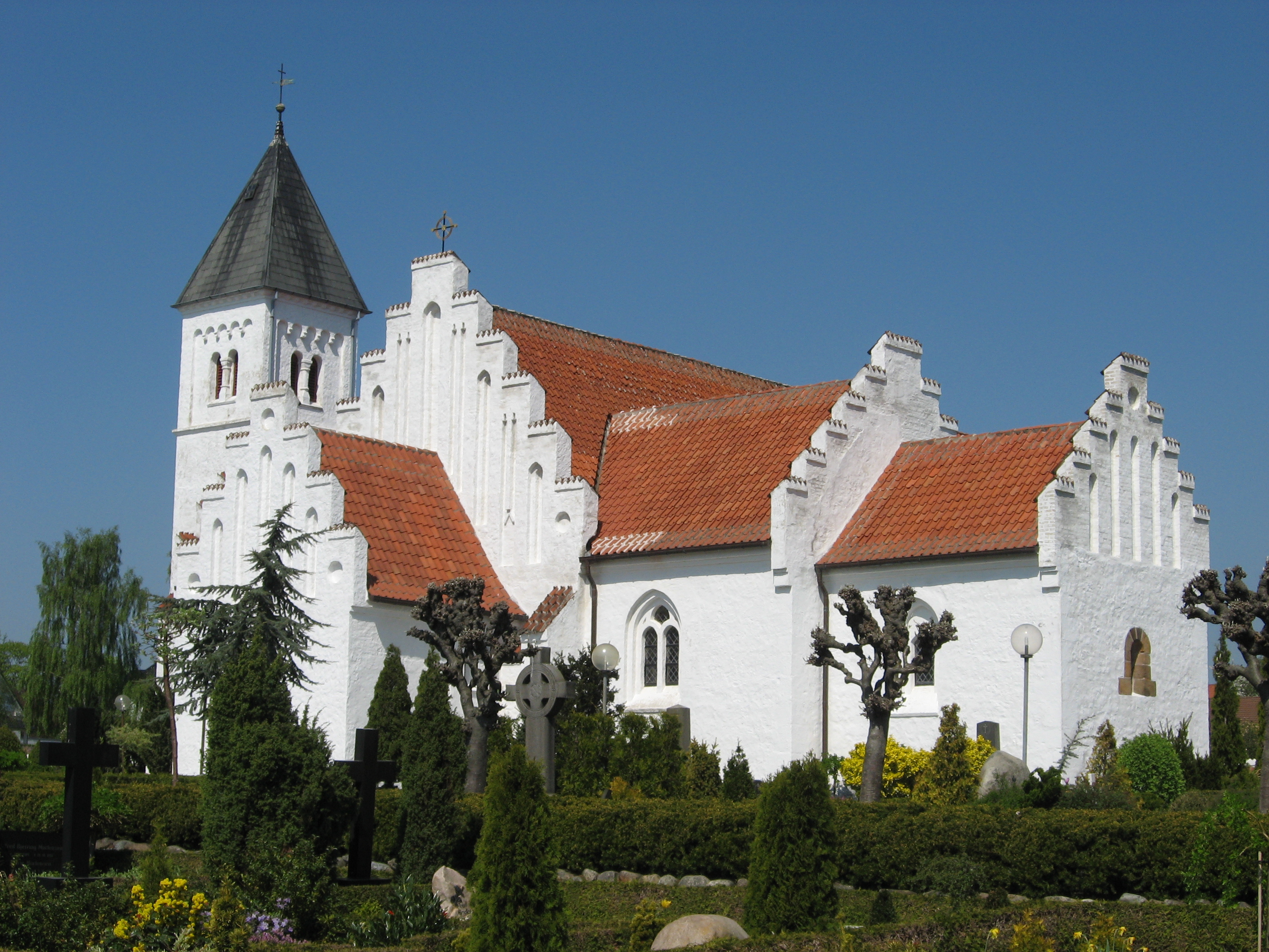 Brabrand Kirke in Brabrand Sogn in Århus Kommune, Denmark.